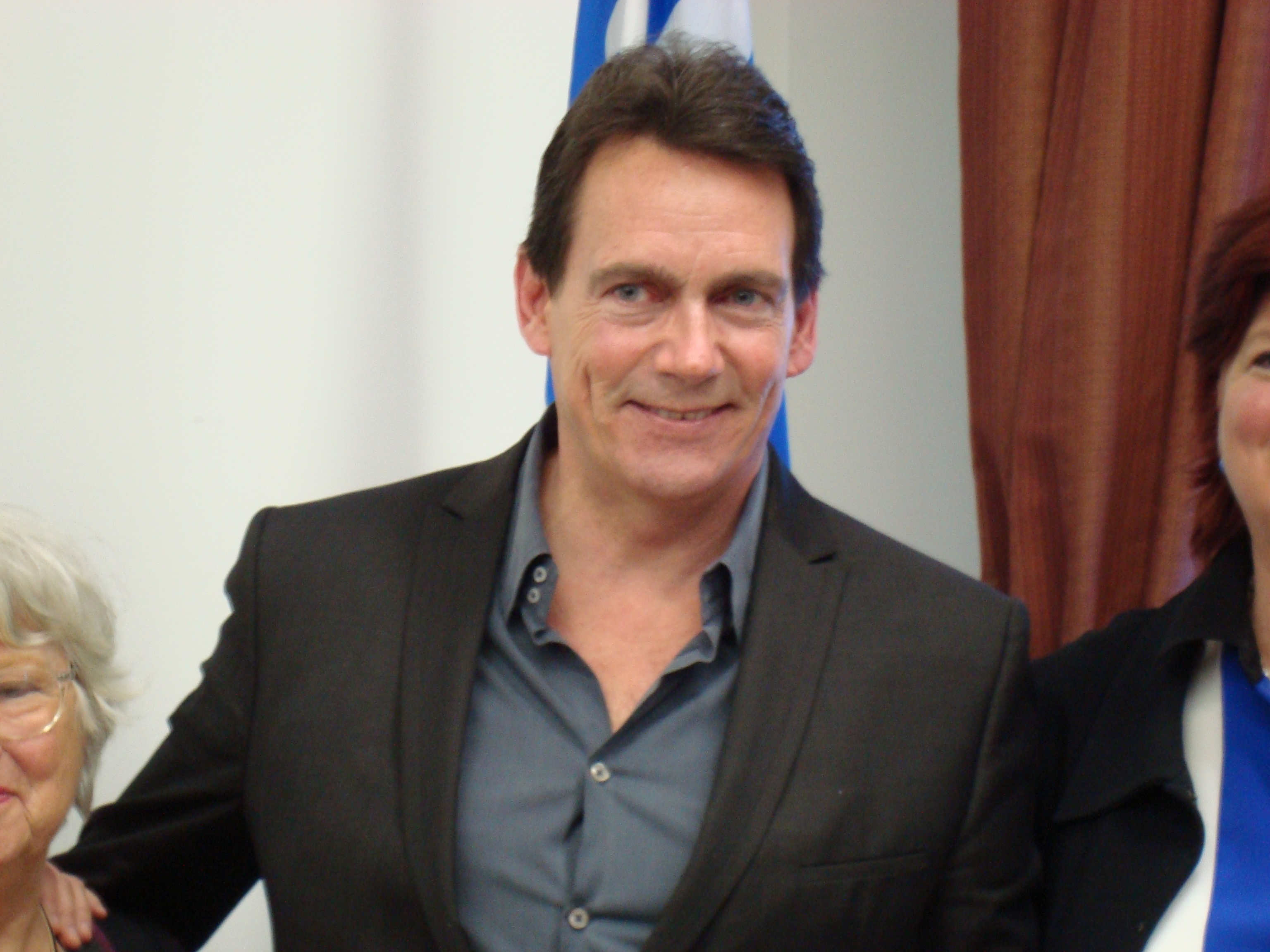 Photo de Pierre Karl Péladeau